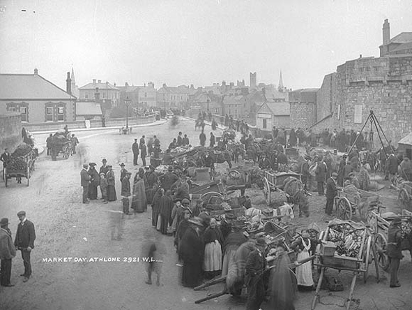 NLI Ref.: LROY2921